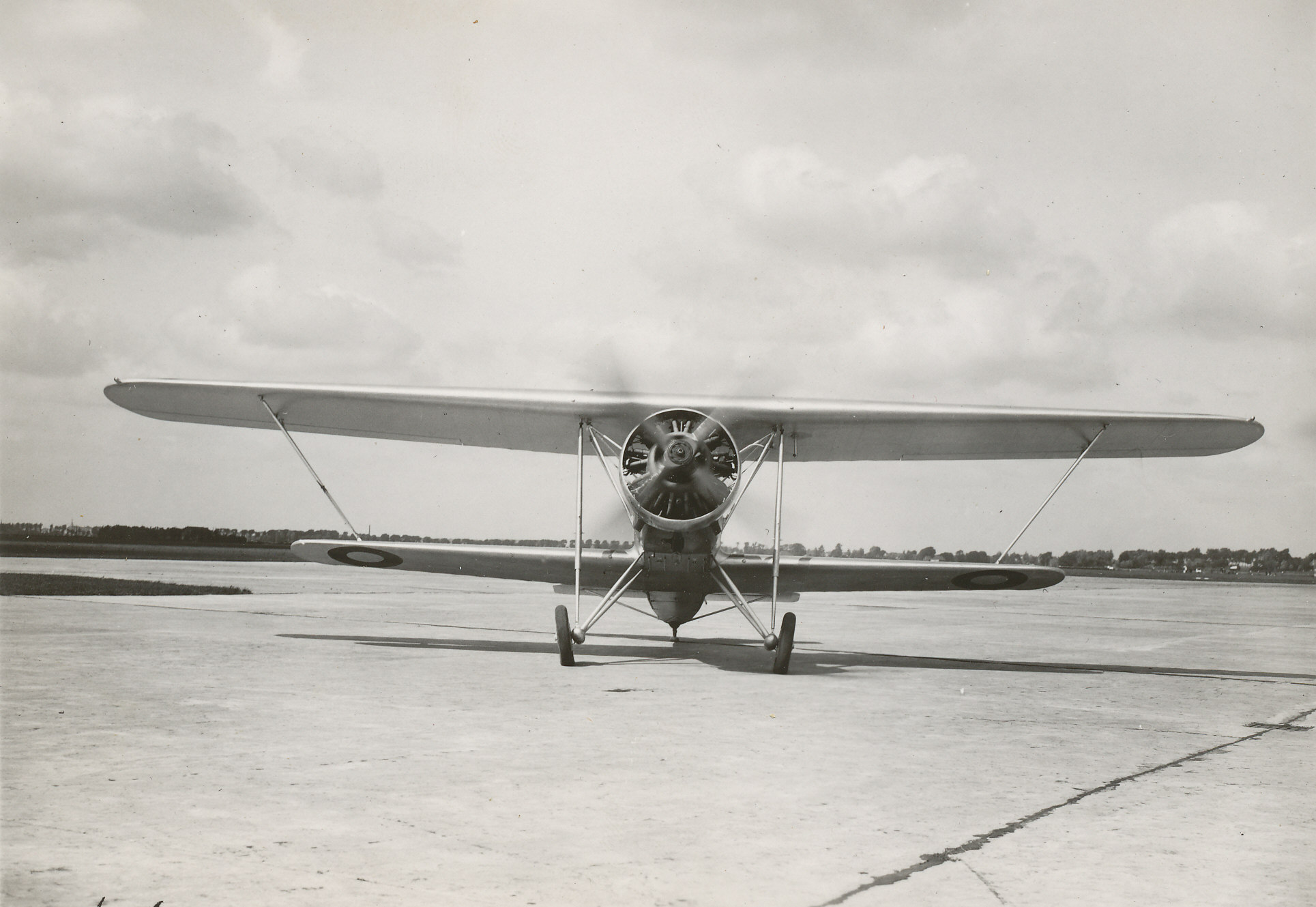 Fokker C-5 voor Denemarken